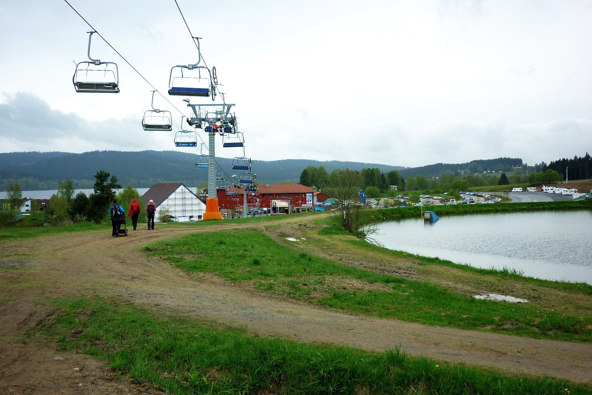 Lipno nad Vltavou - lanovka na stezku v koruných stromů